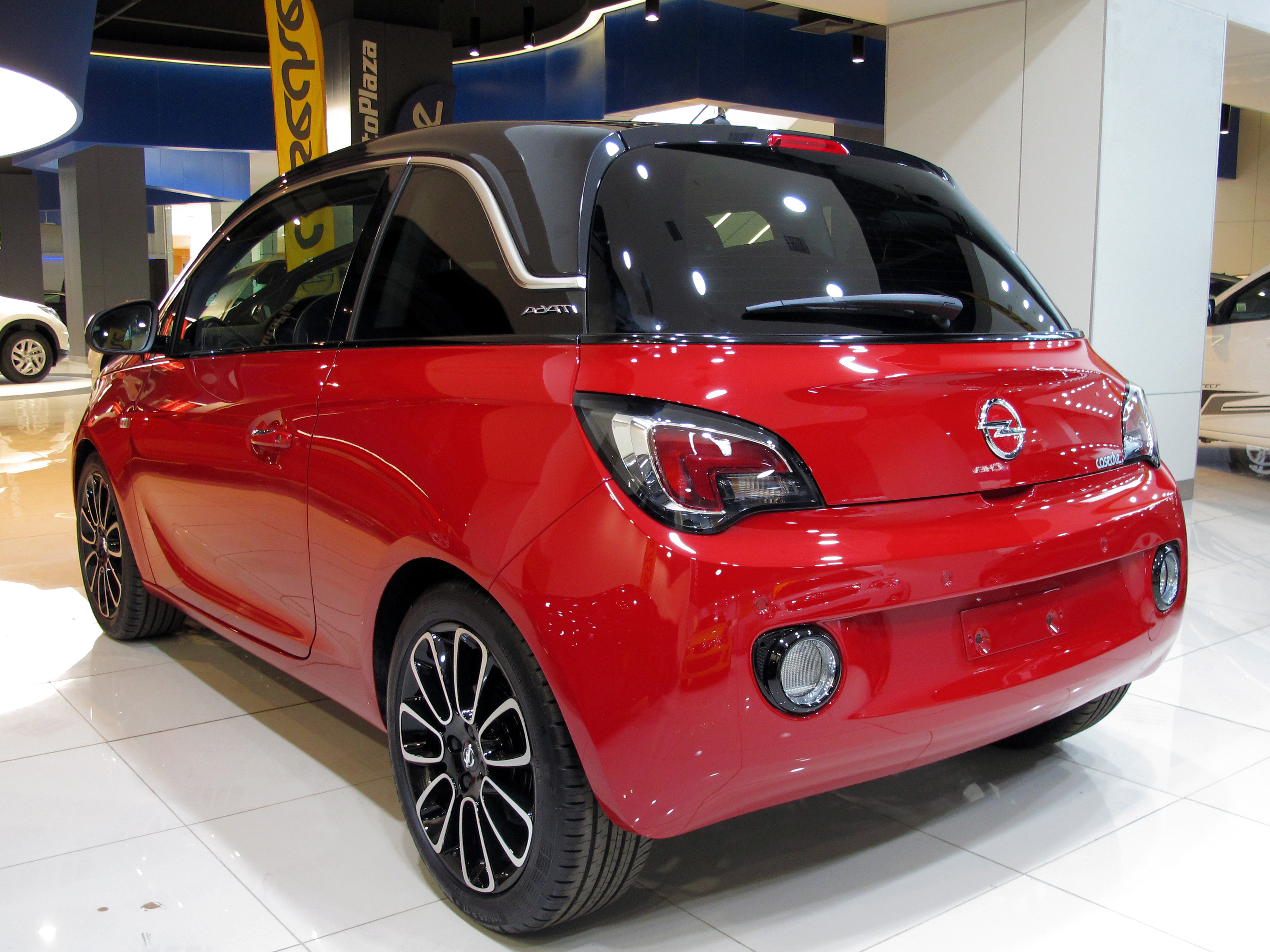 Opel Adam 1.4 Glam 2015